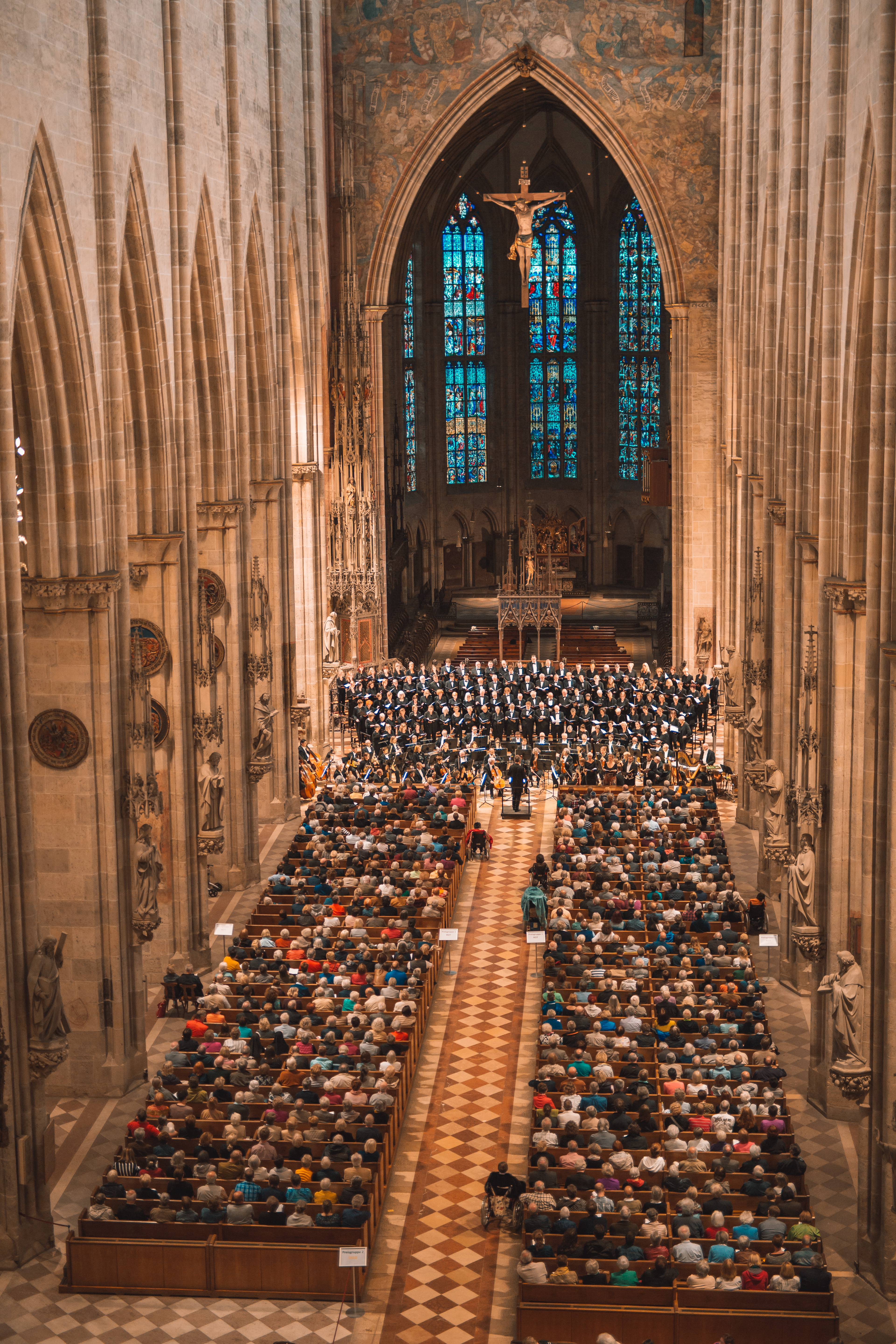 Motettenchor der Münsterkantorei, Philharmonisches Orchester der Stadt Ulm sowie Mitglieder des Petruschors Neu-Ulm und der Wiblinger Kantorei